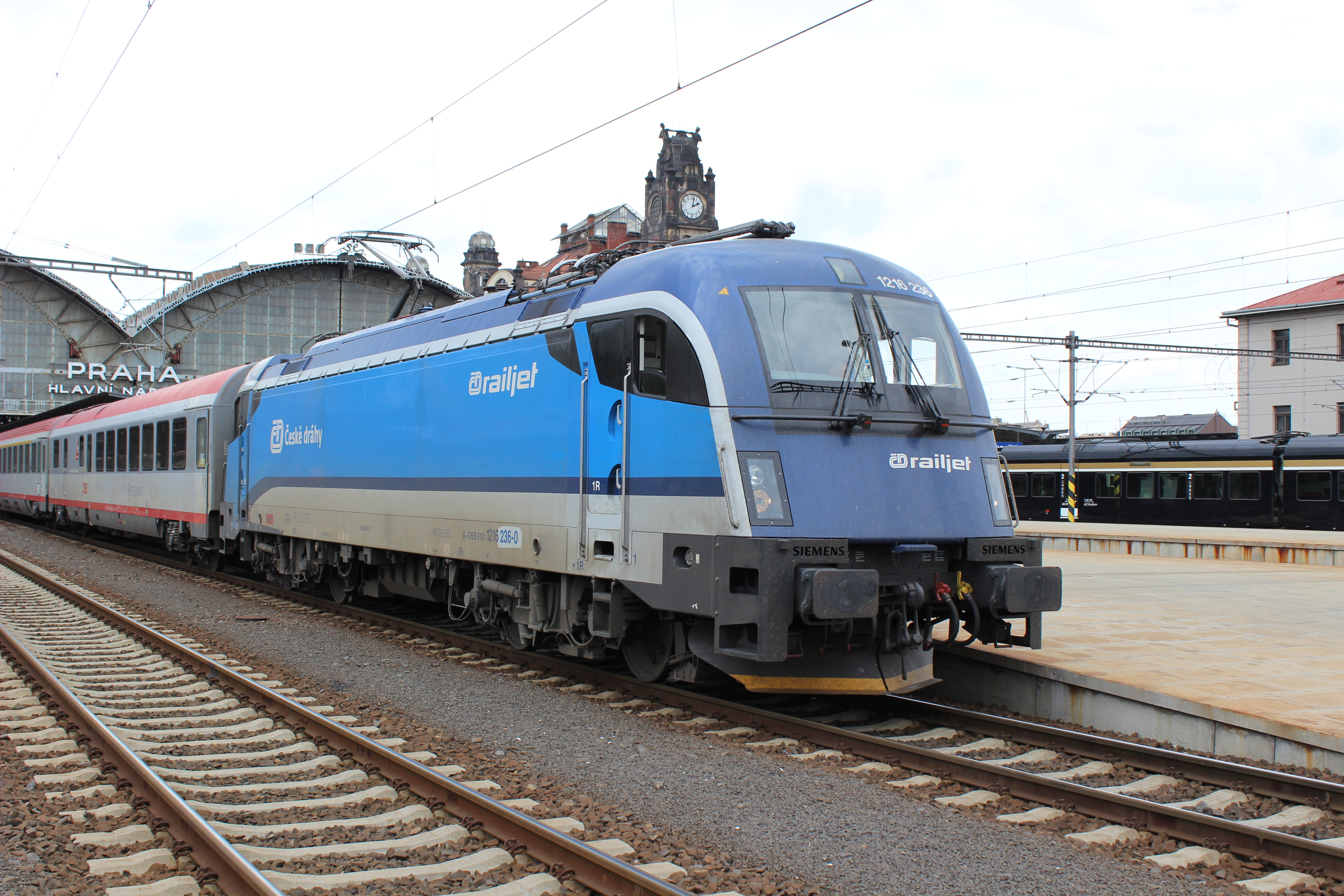 Lokomotiva 1216 236-0 na pražském Hlavním nádraží.